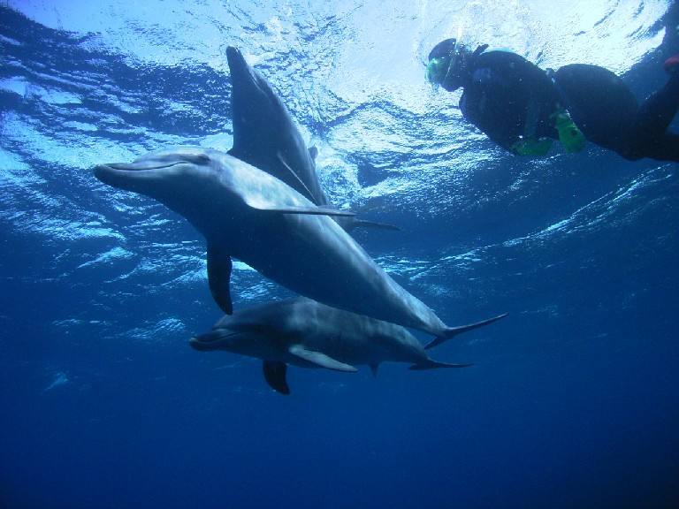 2006年5月8日 御蔵島ツアー芥先生とイルカ